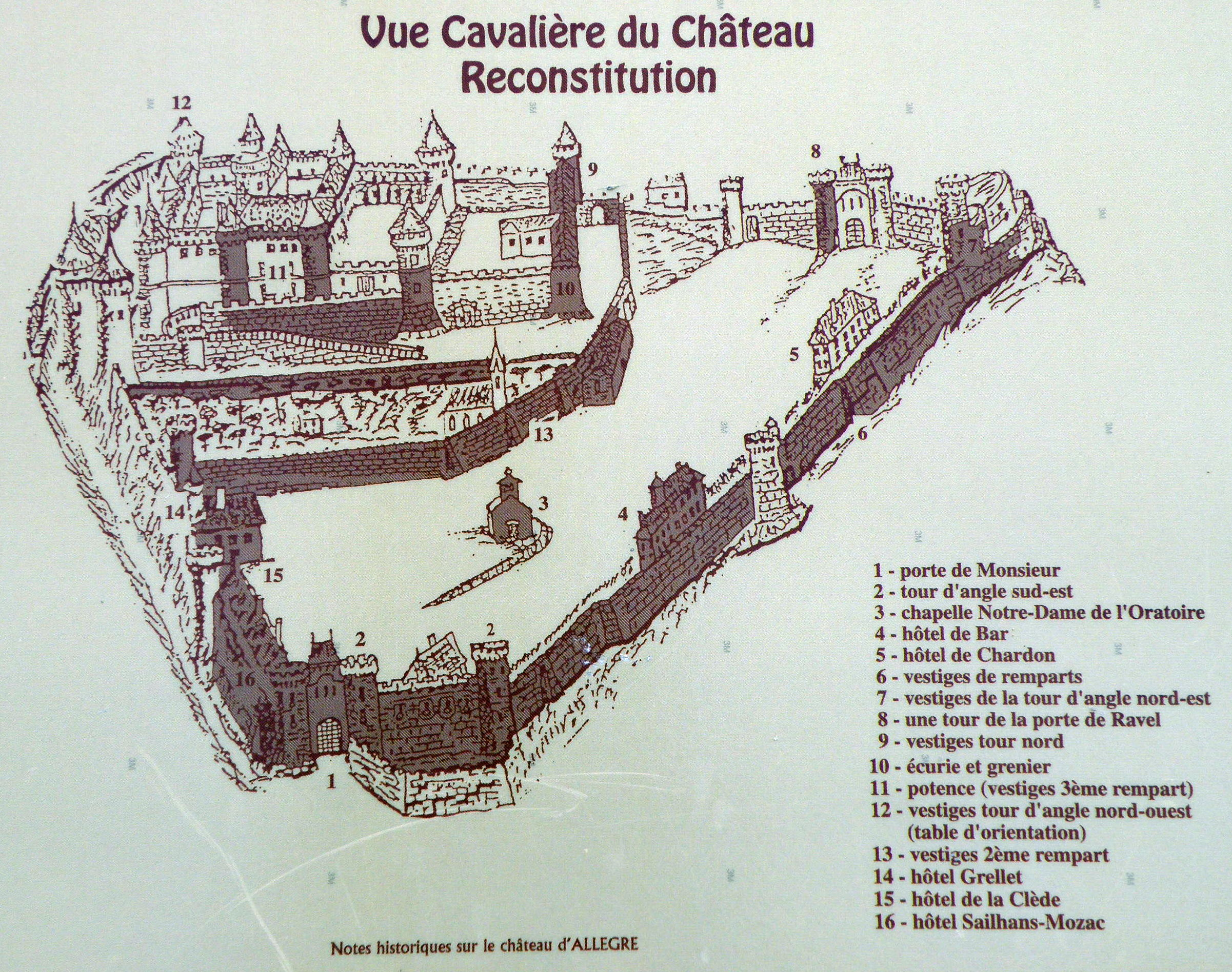 Allègre de Bourbon, dép. de Haute-Loire, France (région Auvergne). Reconstitution du château féodal et des fortifications du bourg d'Allègre ; panneau affiché à l'entrée du château. Copyright : municipalité d'Allègre.